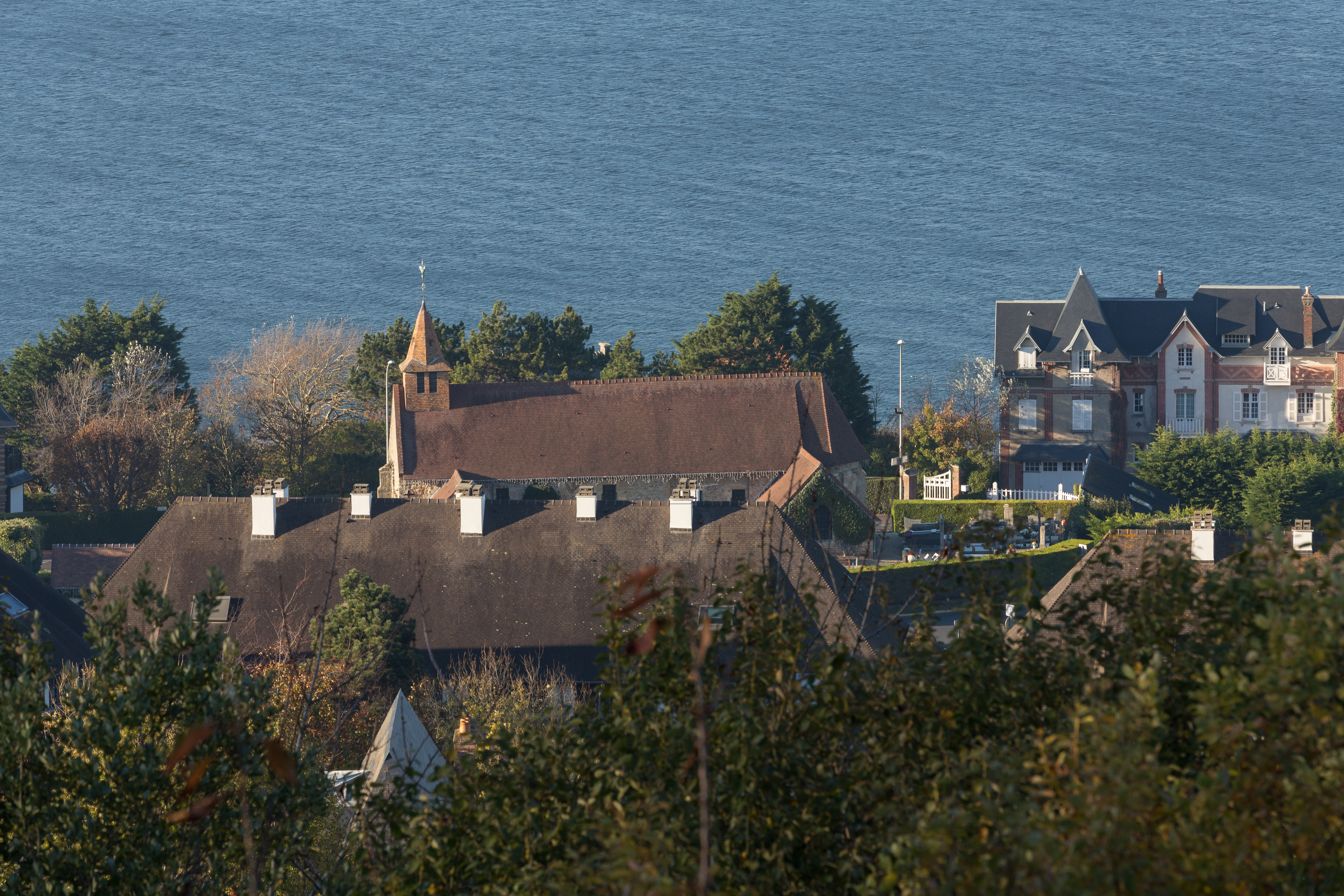 Le bourg de Benerville-sur-Mer vu du mont Canisy.